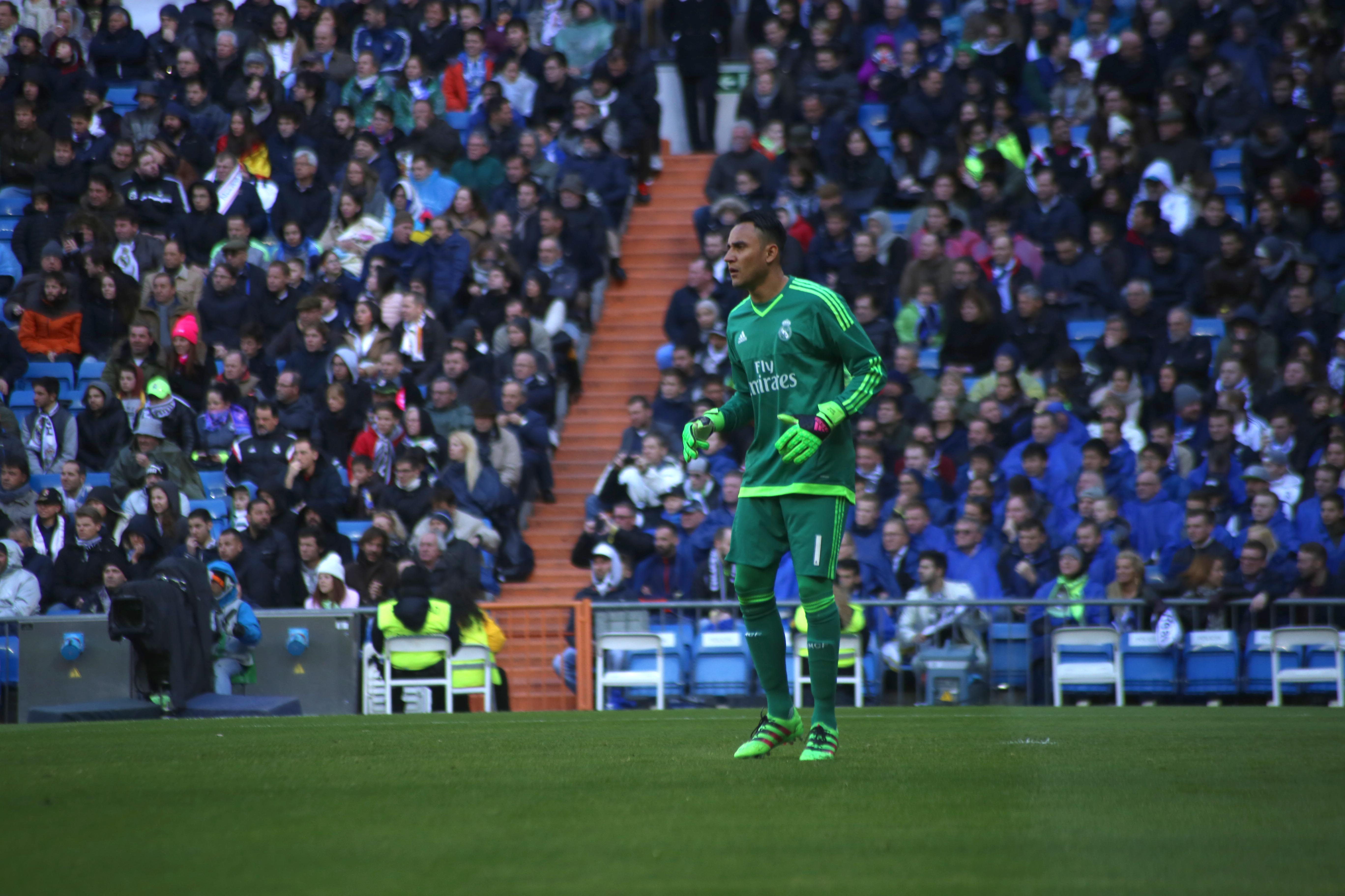 Keylor Navas en el Real Madrid